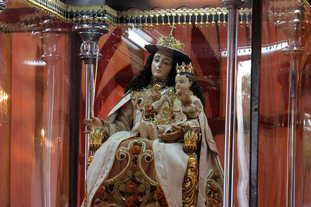 Divina Pastora en 2014